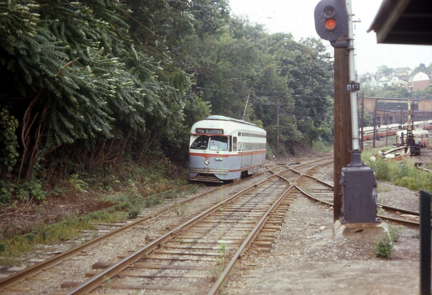 19680824 60 PAT 1762 Palm Garden